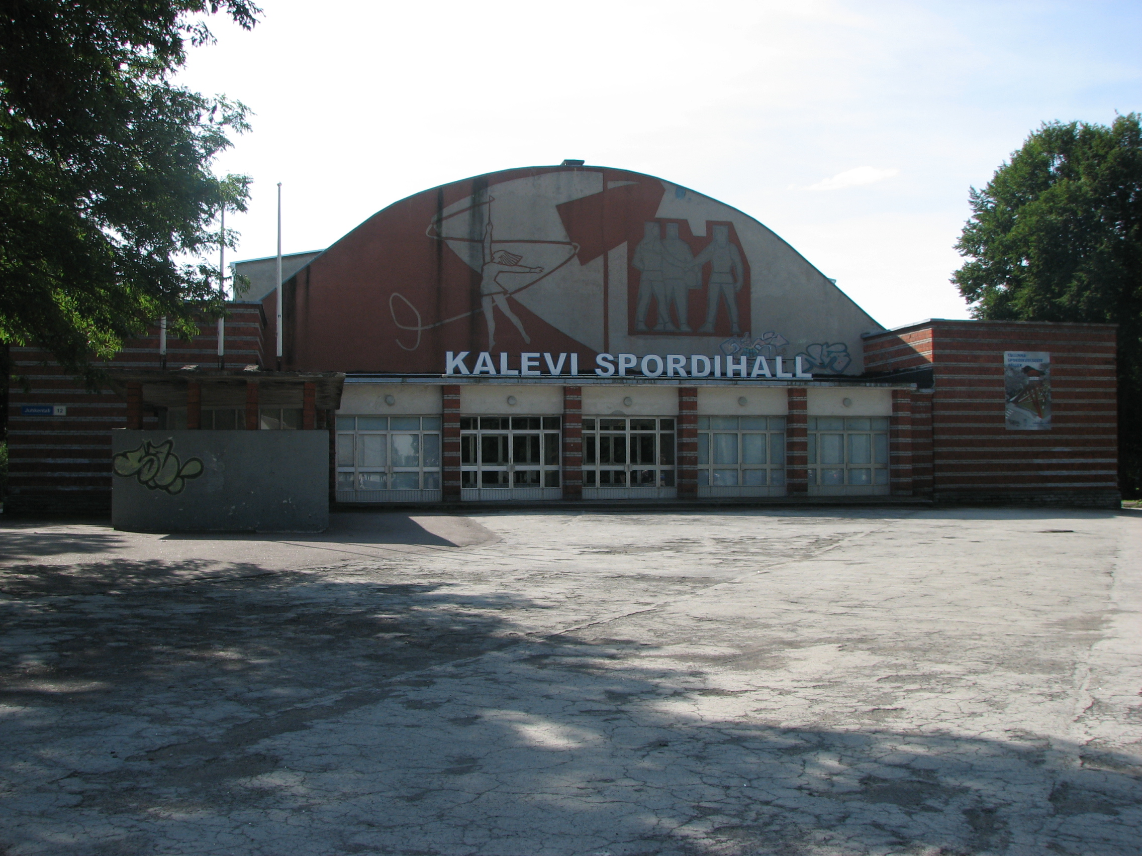 Kalevi spordihall 1962. aastast